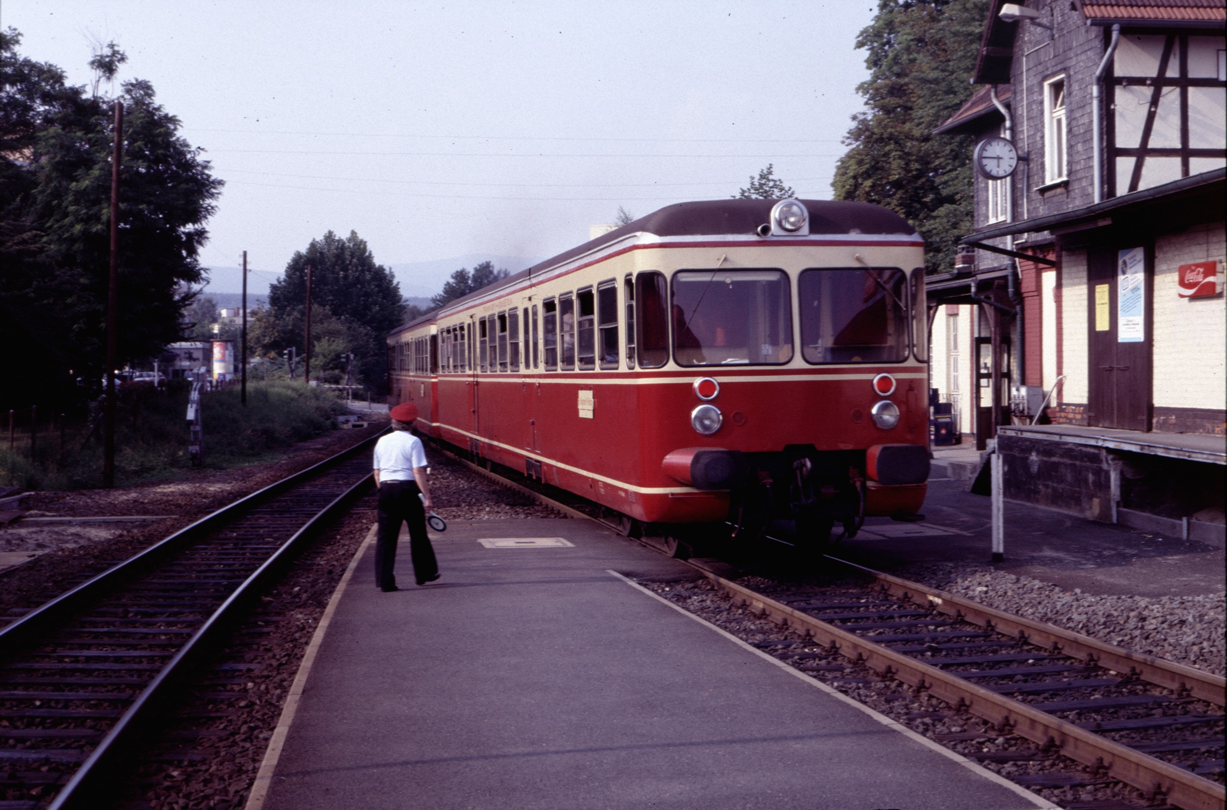 Frankfurt-Königsteiner Eisenbahn Kelkheim 17.08.1984 Esslinger Triebwagen